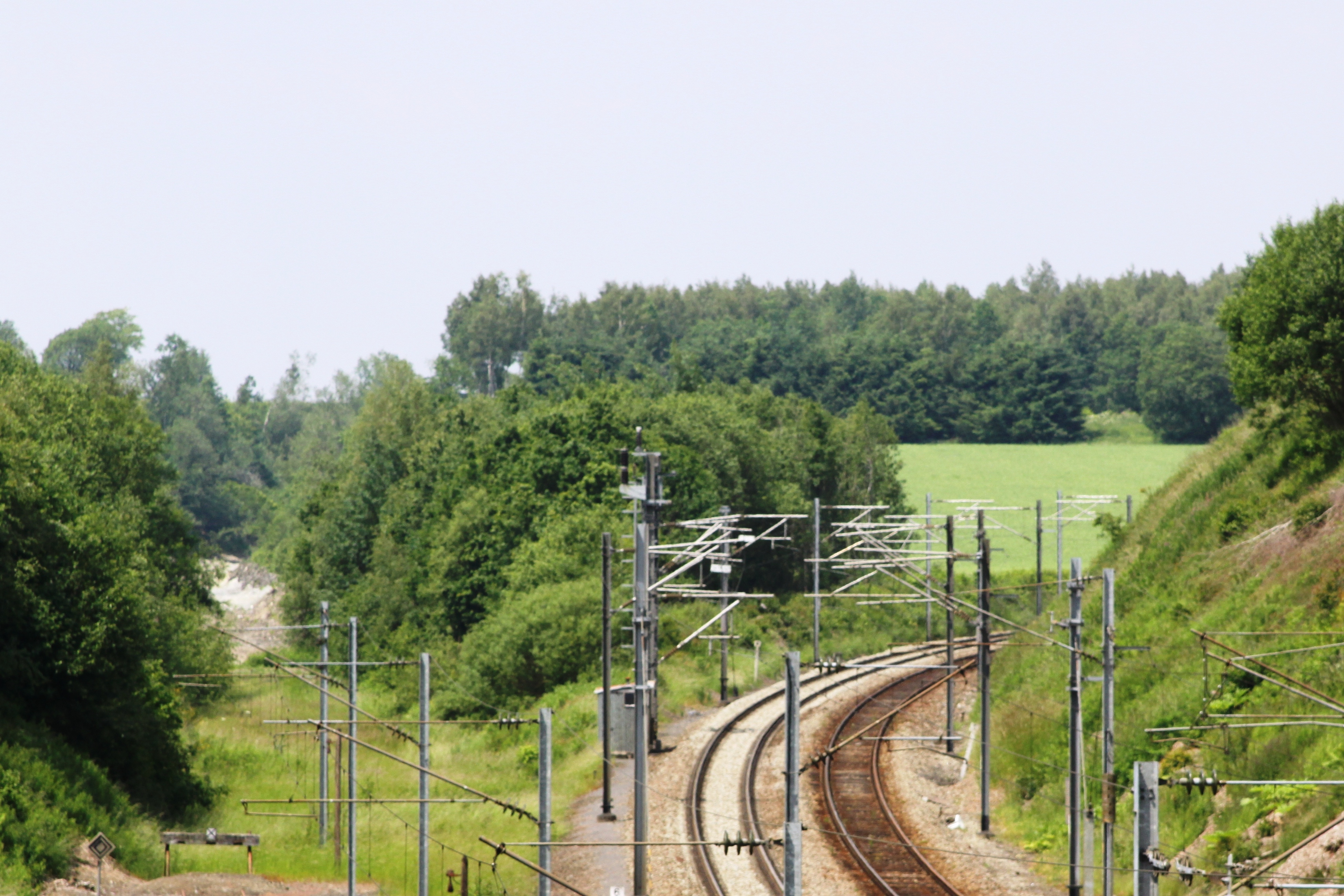 D'SNCB-Linn 42 an der Sortie vu Gouvy, an Directioun Léck. Lénks am Bild tëscht den Hecken den Tracé vun der fréierer Linn 163 an Directioun St.Vith. Gouvy